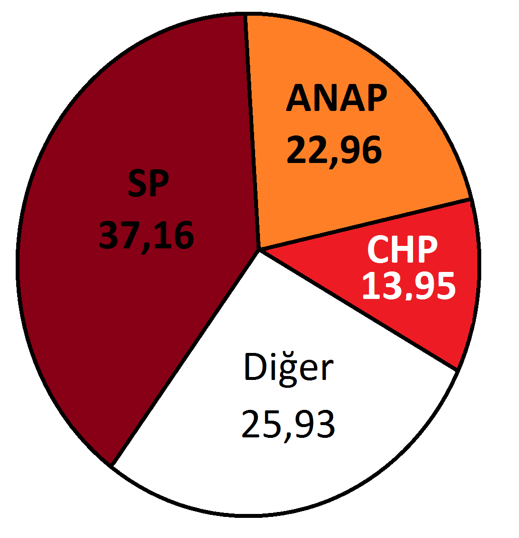 Malatya İlinde 1995 Türkiye genel seçimleri